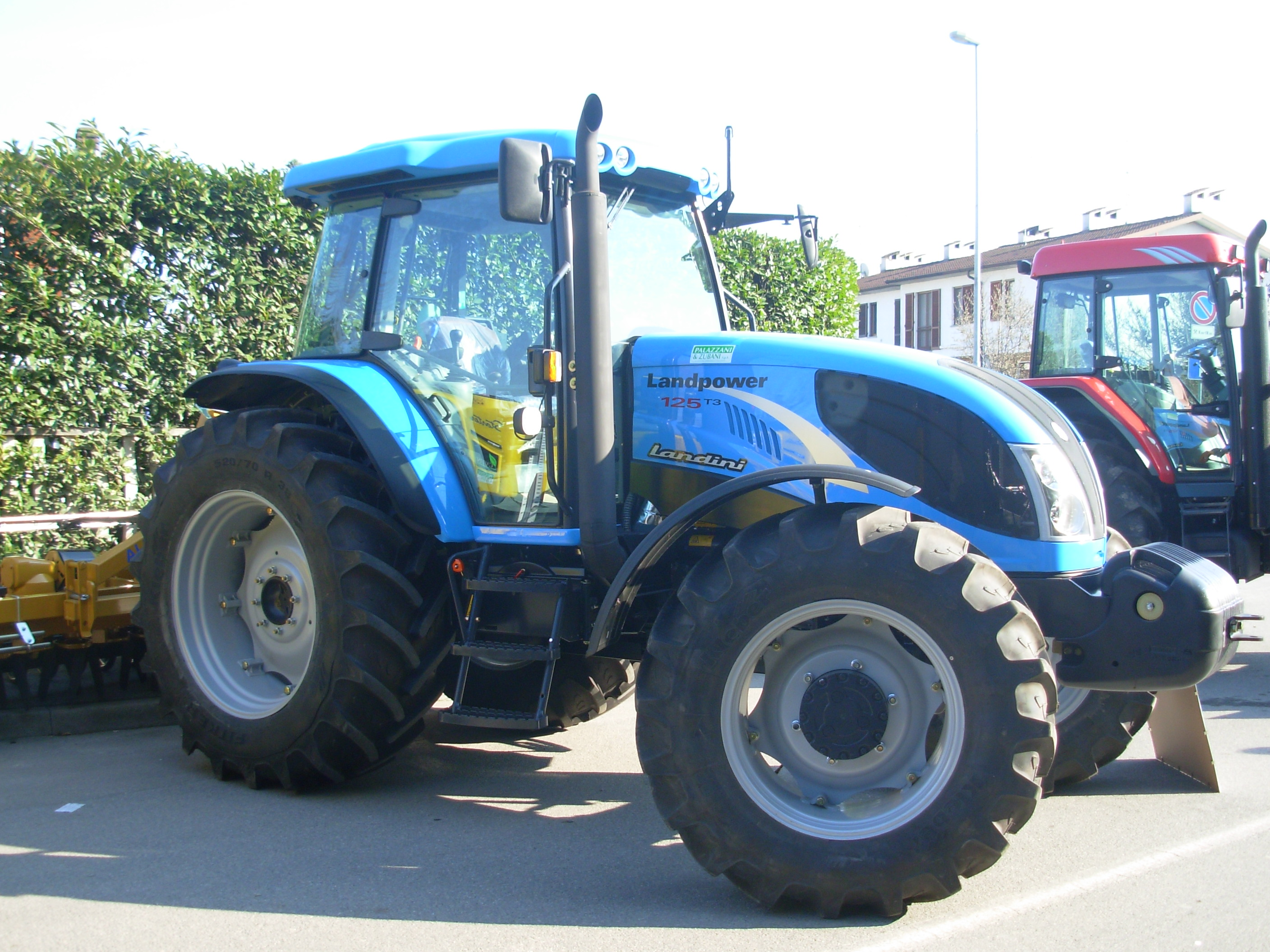 Trattore Landini Landpower 125 T3